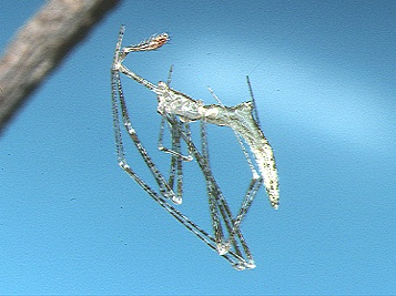 male Rhomphaea labiata from Okinawa.